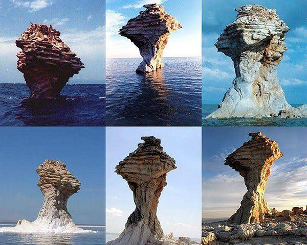 Osman Yumruğu-Urmiya gölü adası